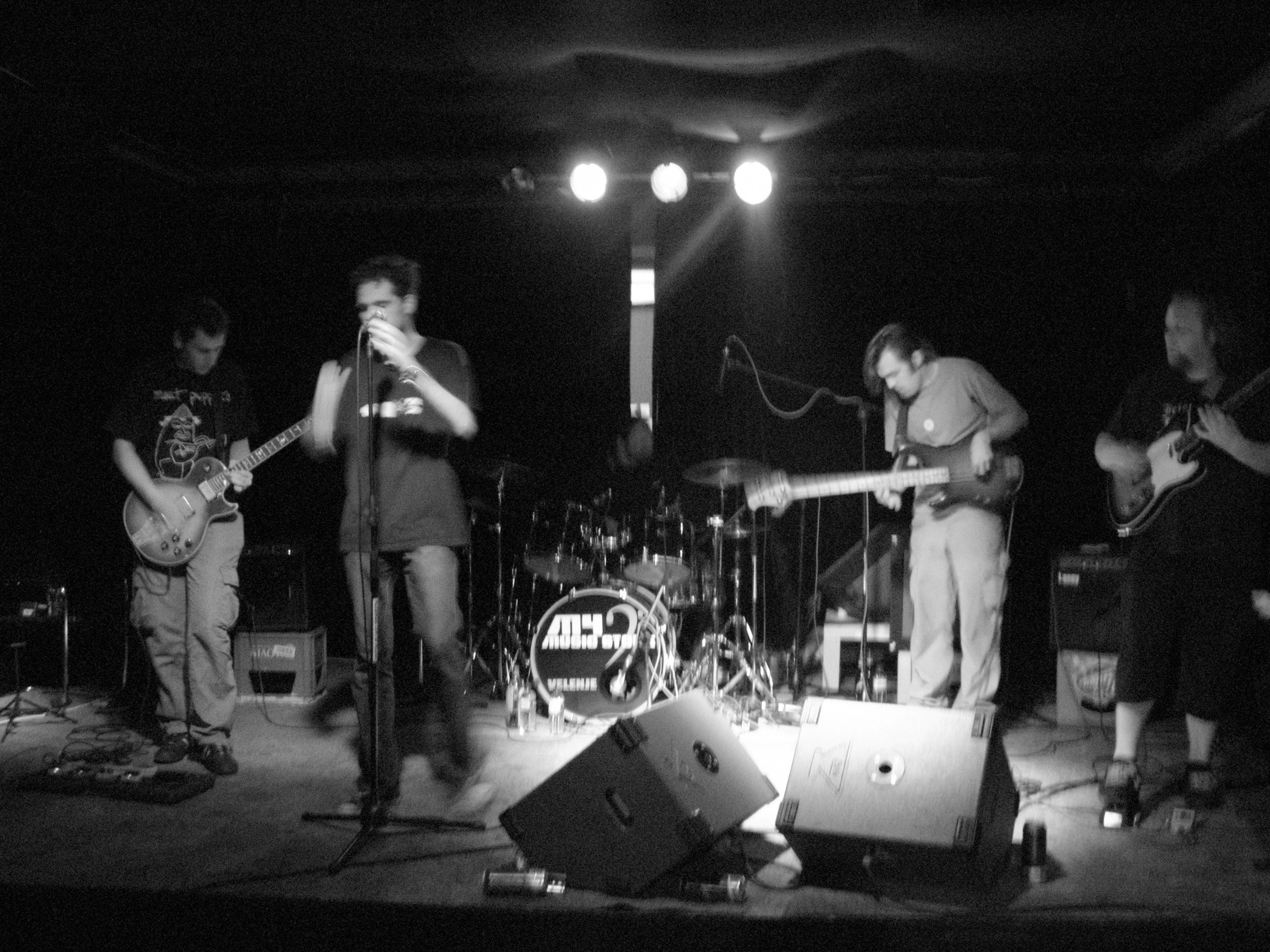 DMK (zadnji dan)_MC Velenje, 23.5. 09